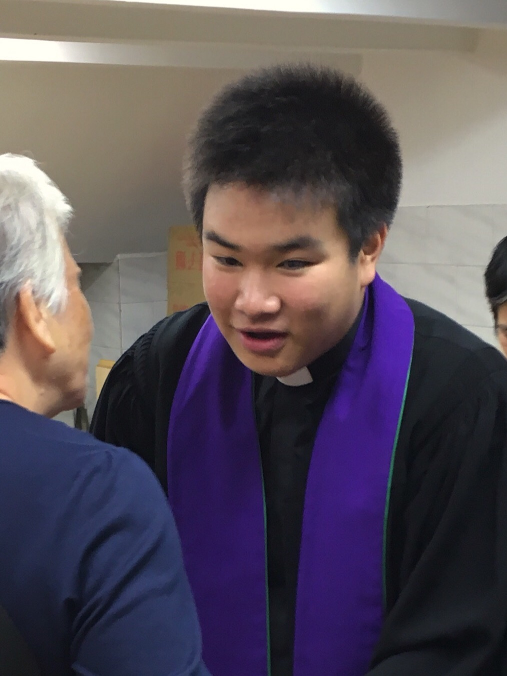 照片拍攝於崇拜後